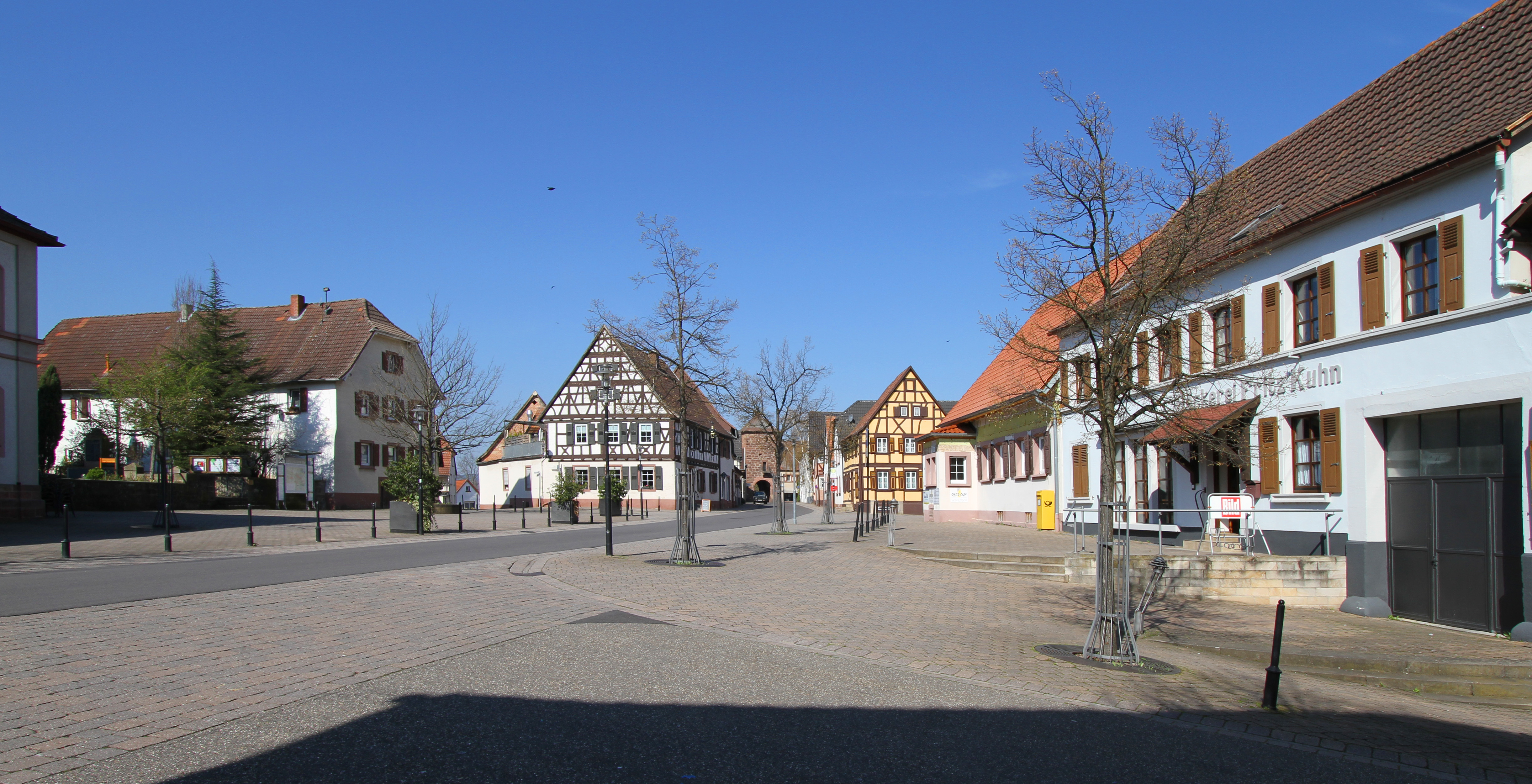 Billigheim